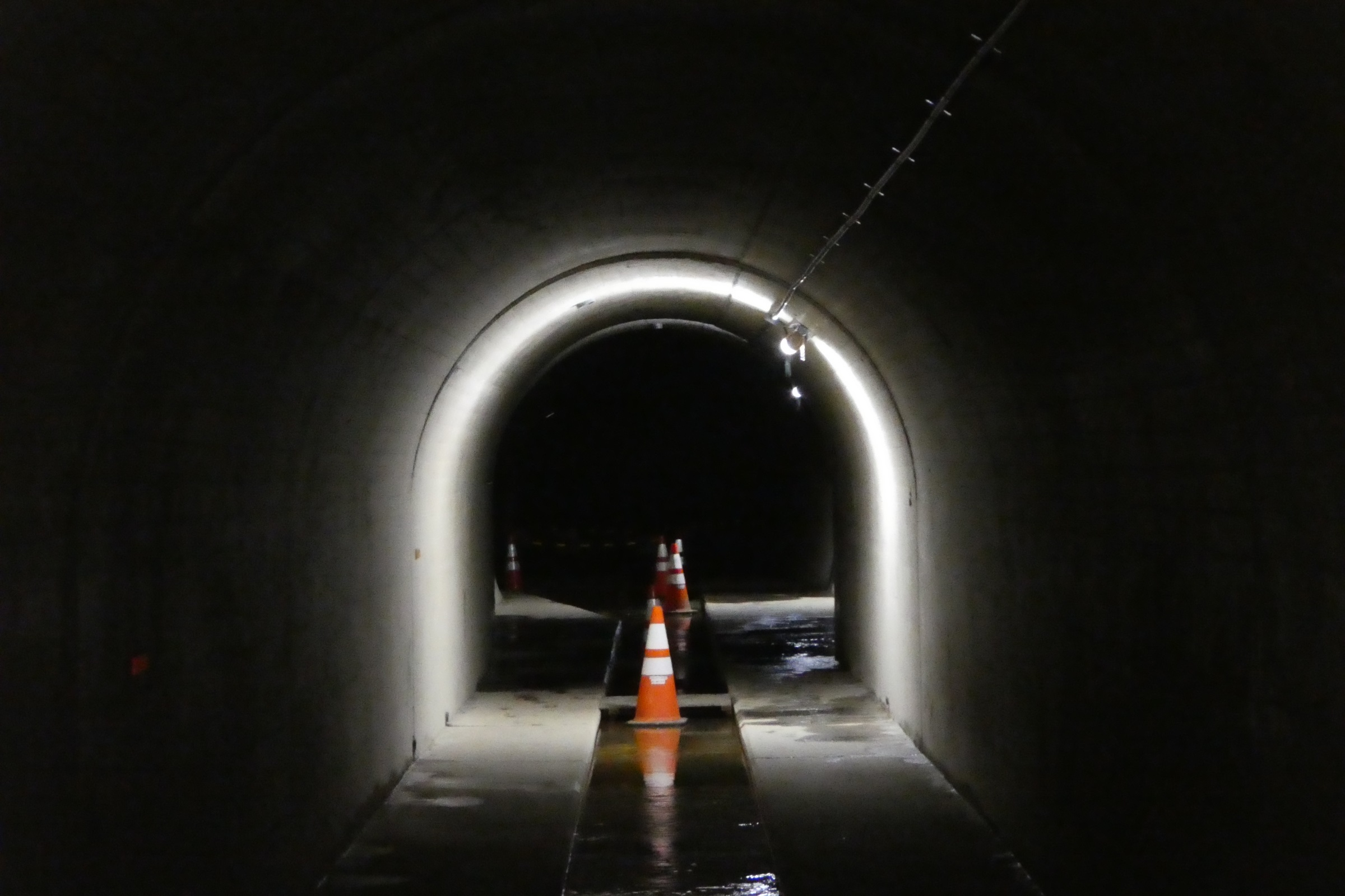 亀の瀬地すべり対策の排水トンネル内部